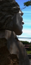 Escultura "Evocación", de Fabio Brenes, en homenaje al cacique Barvak. Barva de Heredia, Costa Rica.